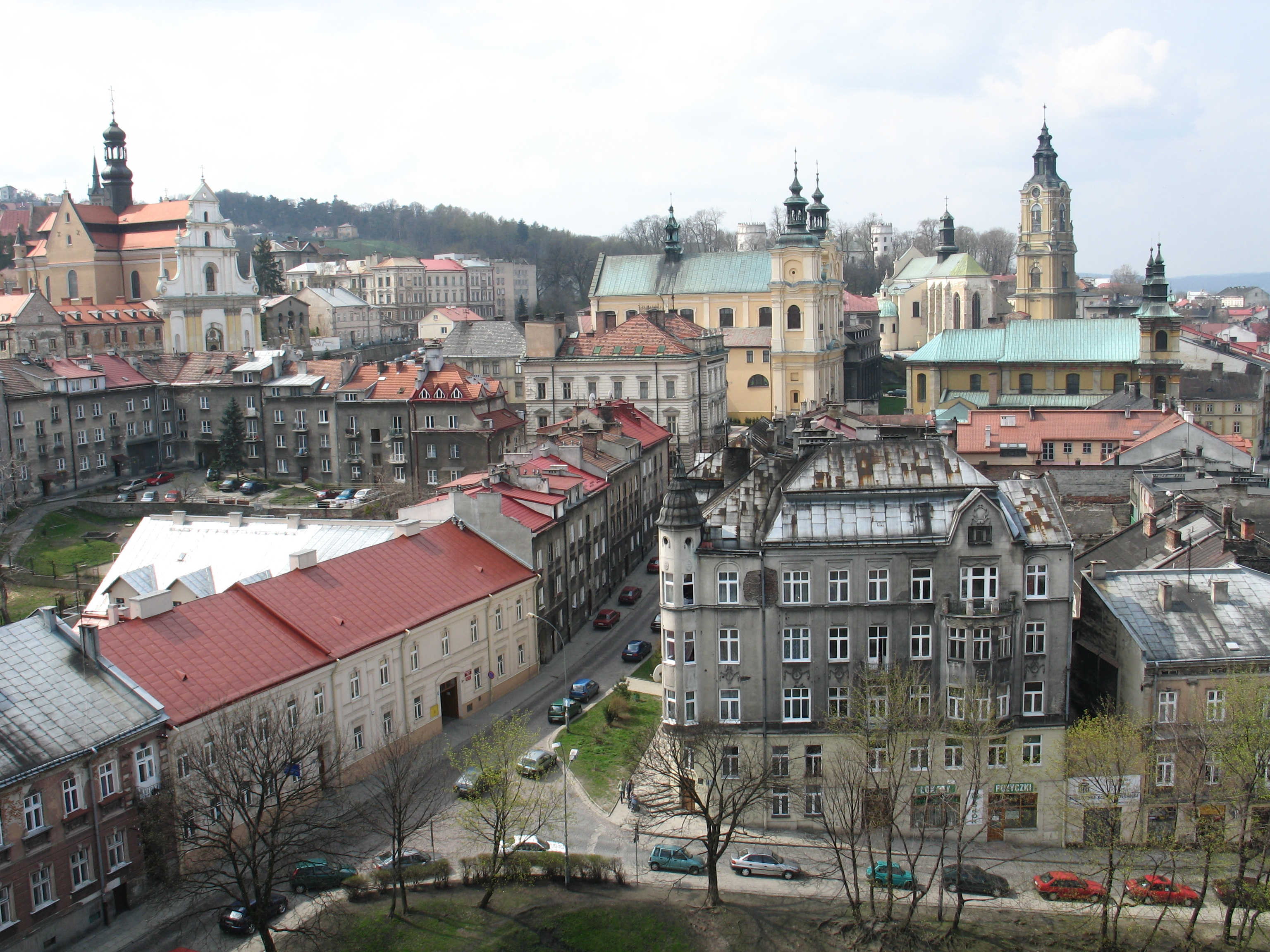 zaspół zabytków